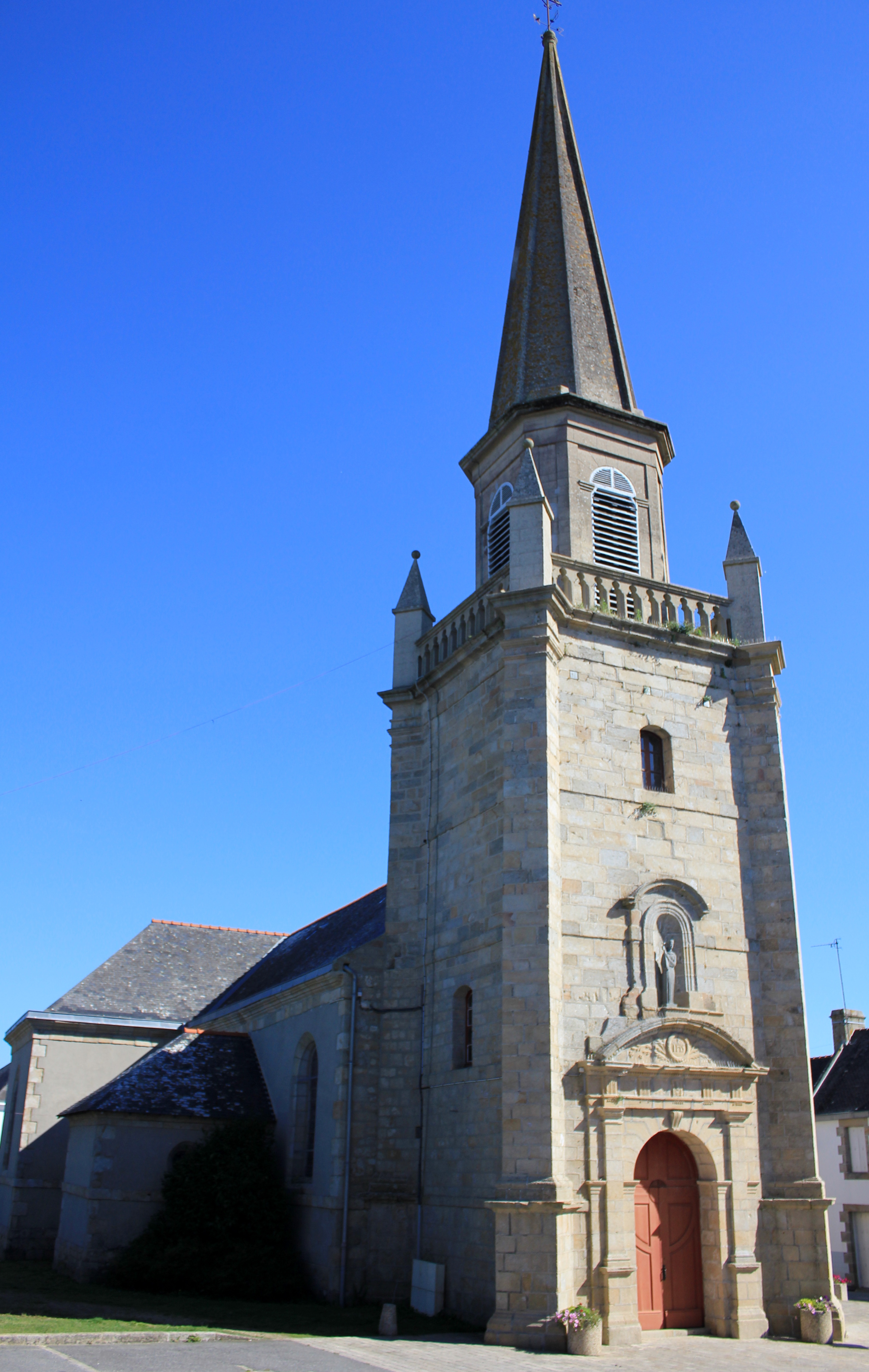 Église Sainte-Hélène (Sainte-Hélène, Morbihan)